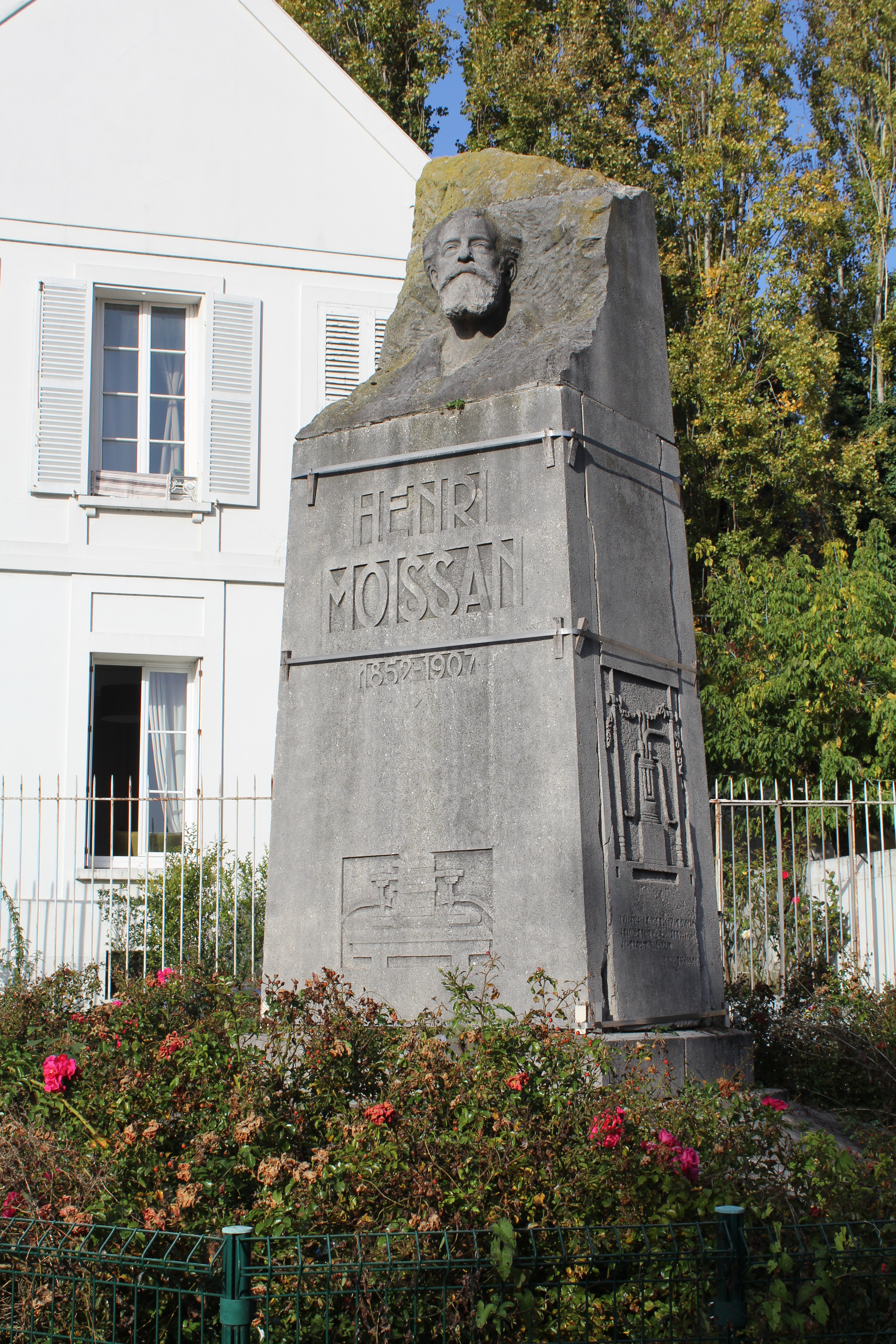 Monument à Henri Moissan, Meaux.